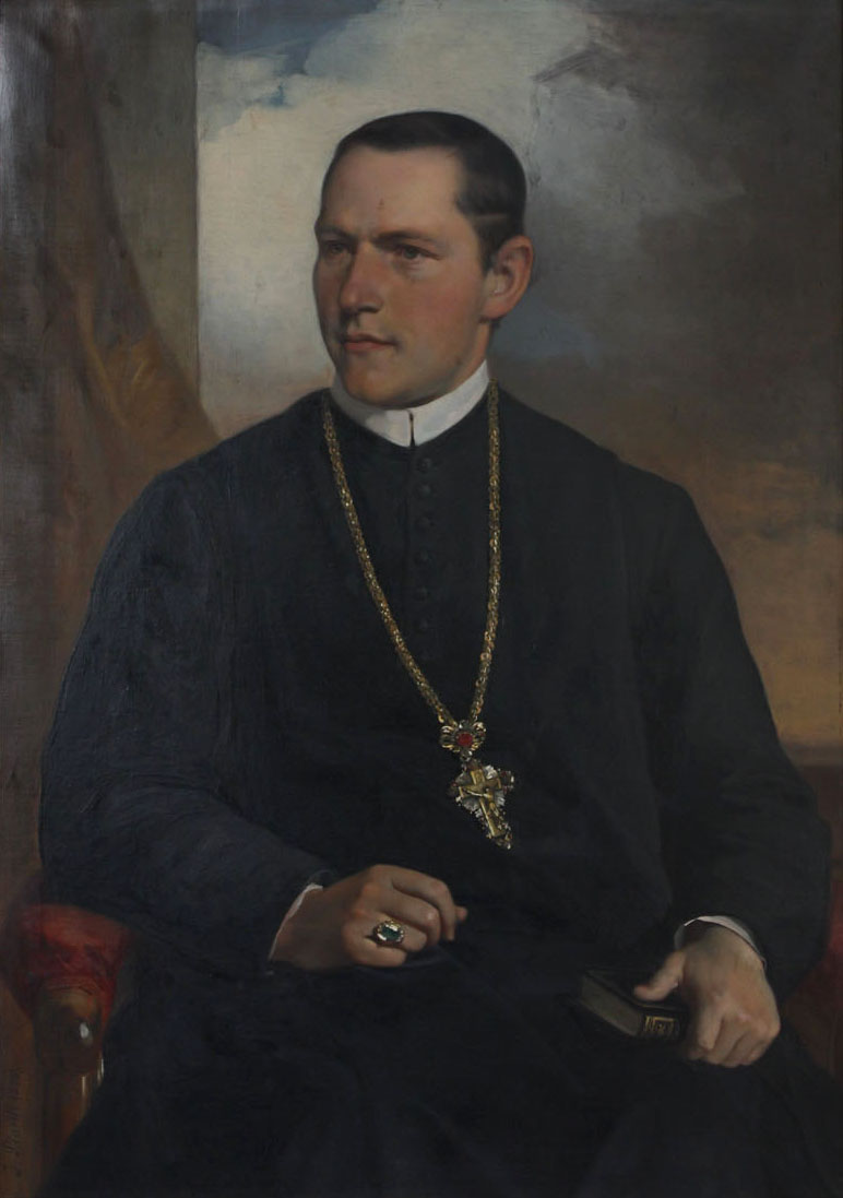 Albert I. Wildauer, Abt von St. Georgenberg-Fiecht (1875-1915)